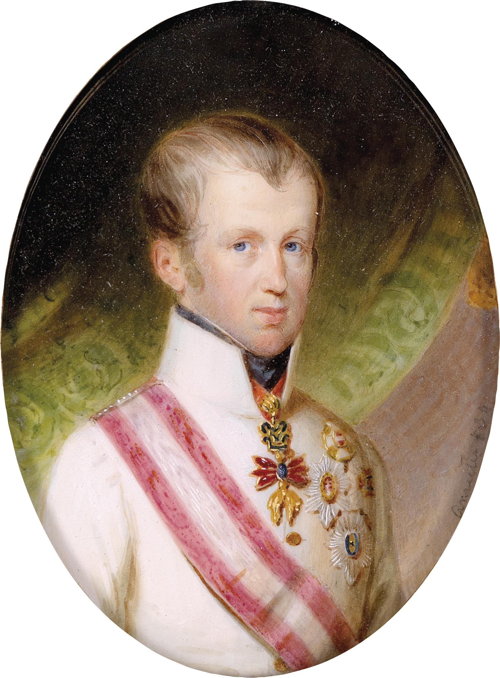 Bildnis Ferdinand I., Kaiser von Österreich in Uniform mit dem Orden vom Goldenen Vlies, signiert und datiert Anreiter (1)834, Aquarell auf Elfenbein, 10,5 x 7,5 cm